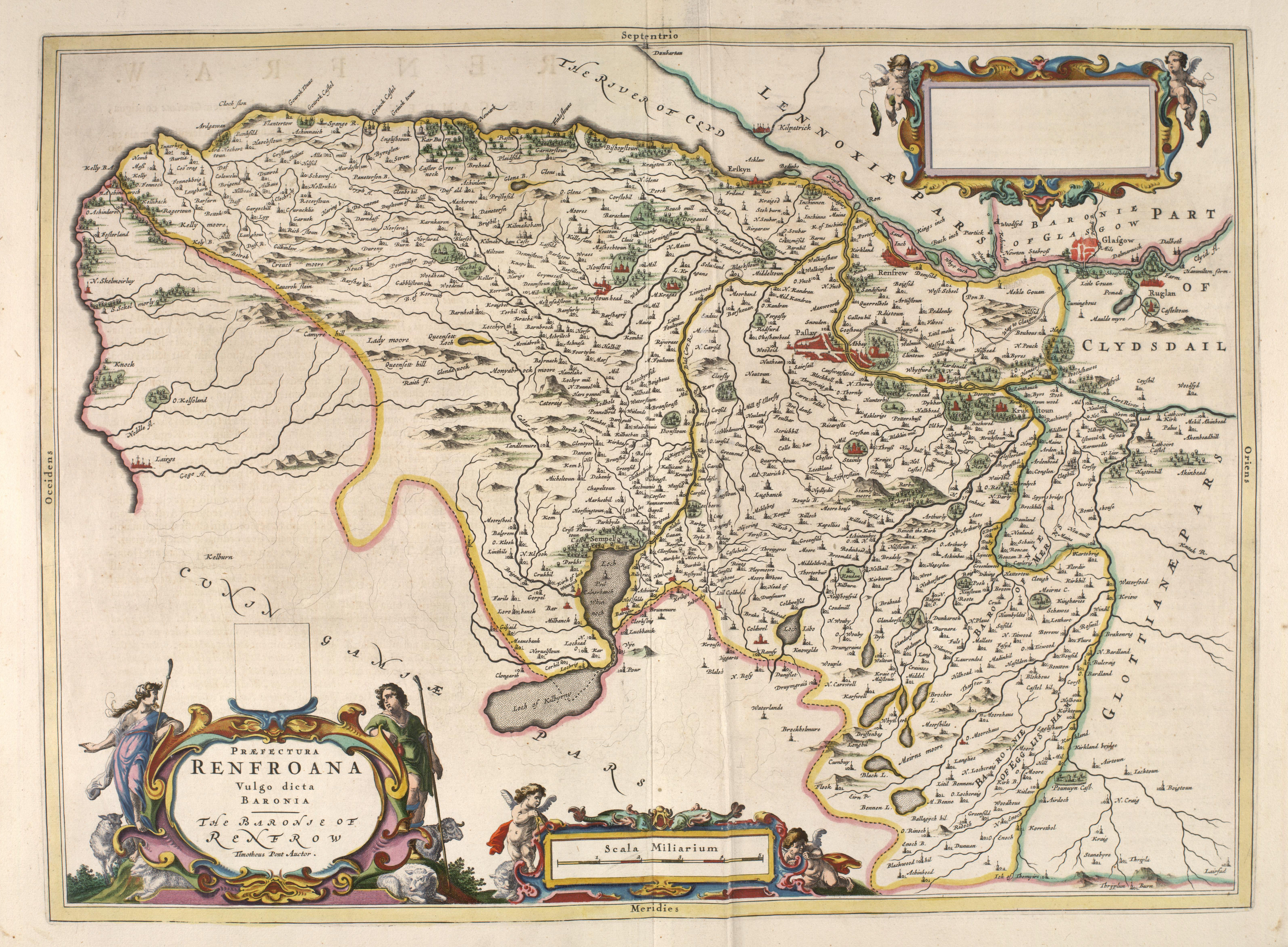 RENFROANA - Renfrew